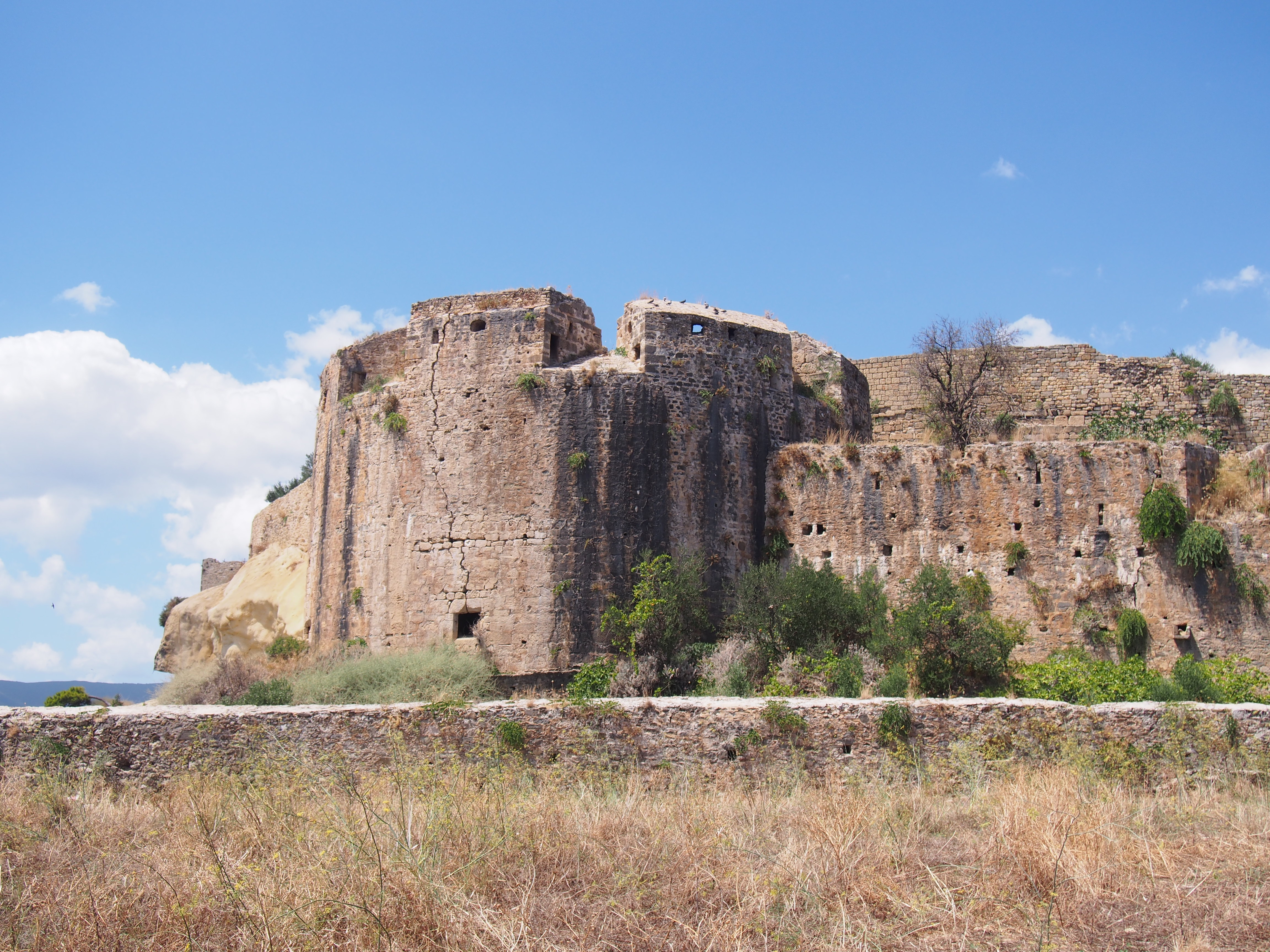 Κάστρο Κορώνης - ο κυκλικός προμαχώνας (IV)«Κάστρο Κορώνης»